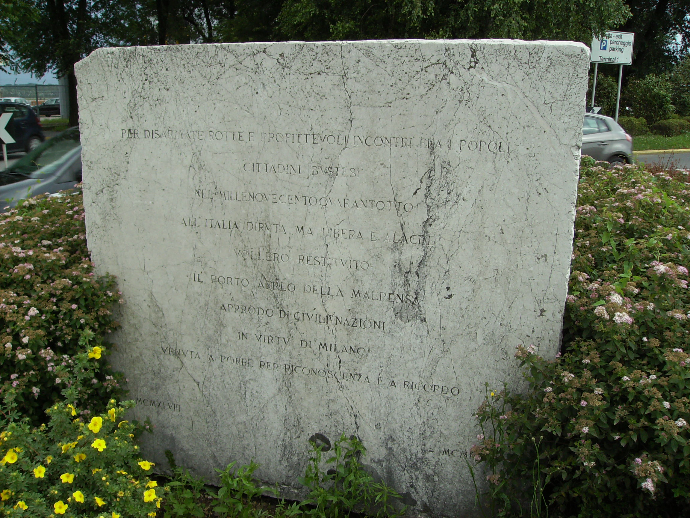 Ceppo commemorativo ai cittadini bustesi